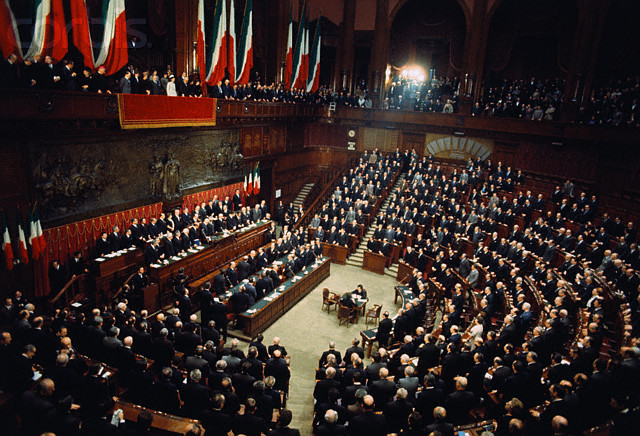 29 dicembre 1971, Giovanni Leone giura al Parlamento riunito in seduta plenaria. Immagine creata in Italia (o in territorio italiano) di pubblico dominio poiché il suo copyright è scaduto. Secondo la Legge 22 aprile 1941 n. 633, modificata dalla legge 22 maggio 2004, n. 128 articolo 87 e articolo 92, le foto generiche e prive di carattere artistico e le riproduzioni di opere dell'arte figurativa divengono di pubblico dominio a partire dall'inizio dell'anno solare seguente al compimento del ventesimo anno dalla data della prima pubblicazione.